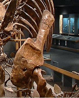 left Stegosaurus stenops Scapulocoracoid